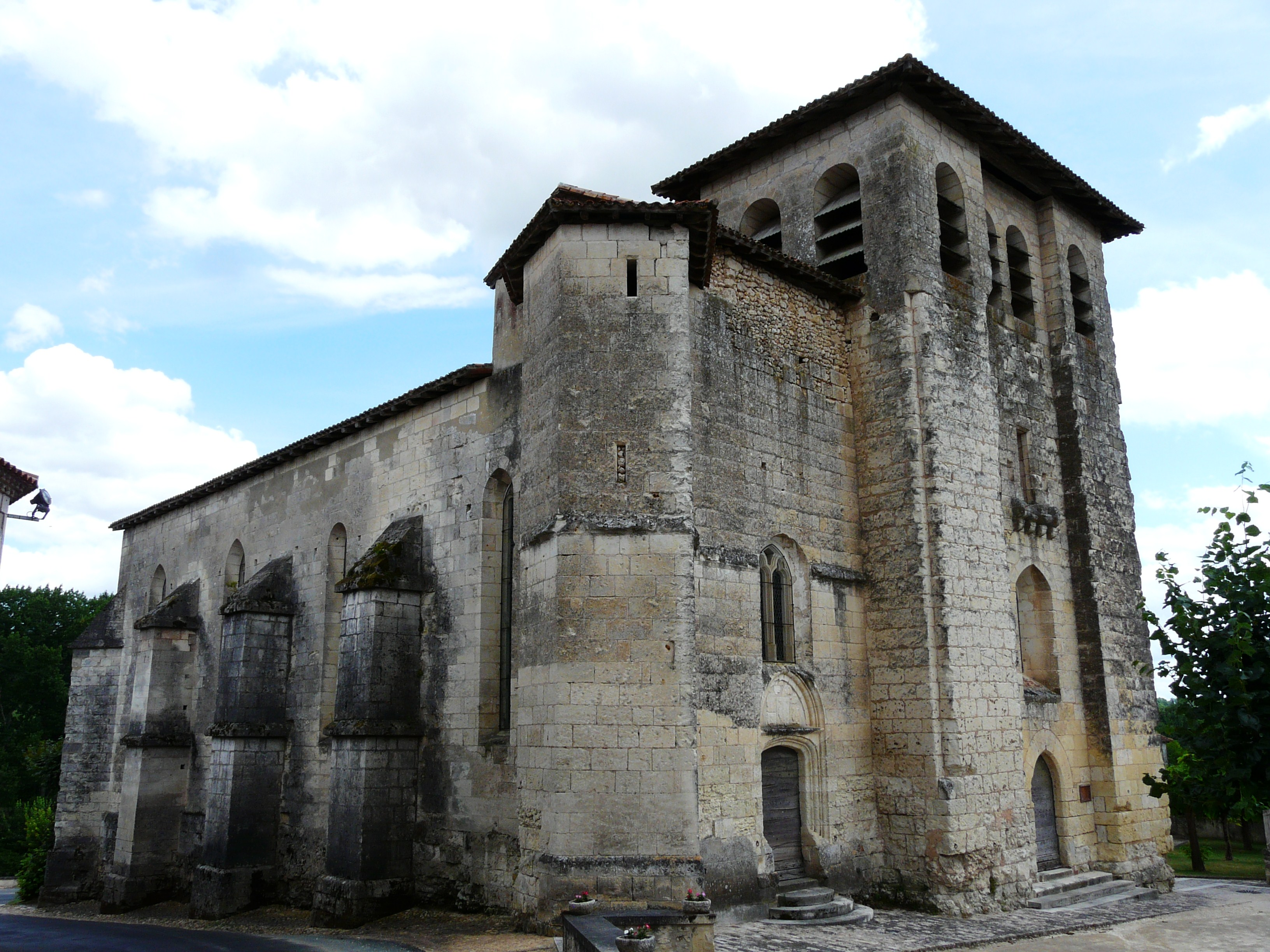 Église Saint-Pierre-ès-Liens, Chantérac, Dordogne, France